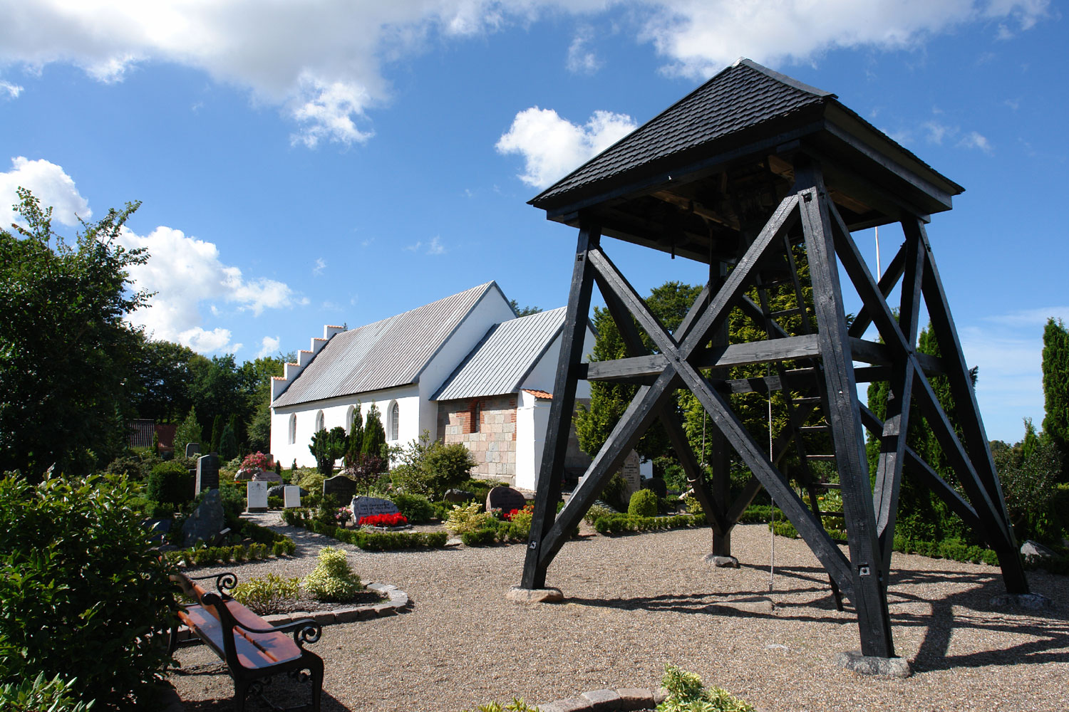 Alte Kirche von Sindal (Sindal Gamle Kirke), stammt aus dem Jahr 1200